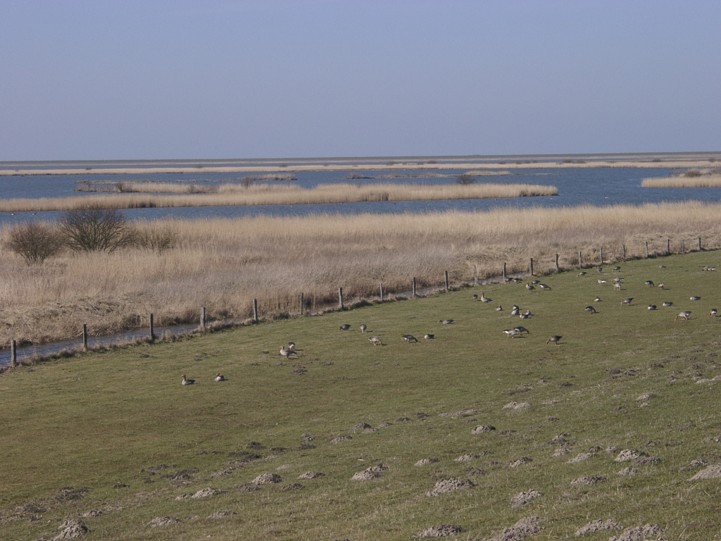 Beltringharder Koog: Feuchtgrünland mit rastenden Graugänsen (Anser anser)